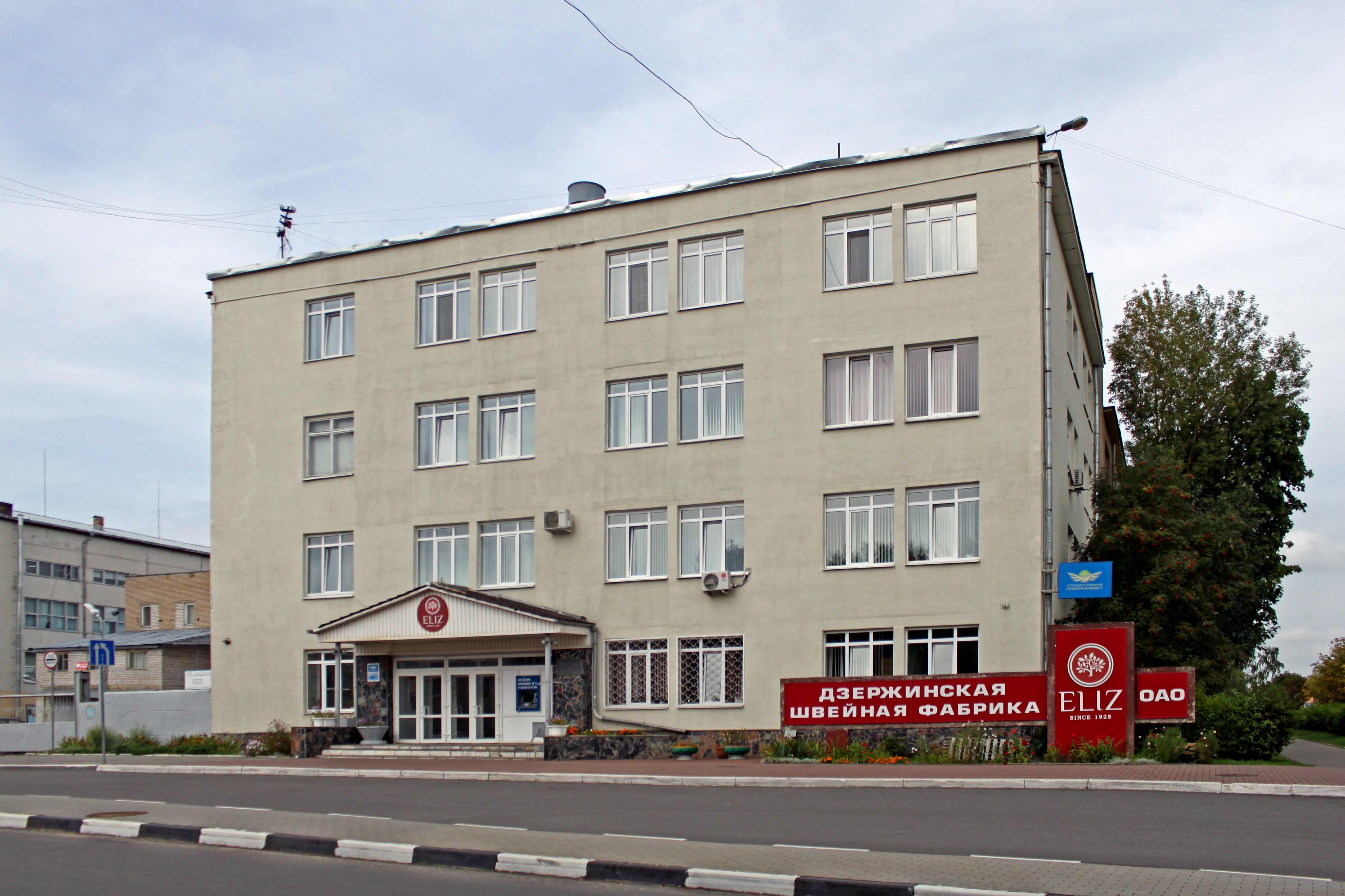 Швейная фабрика "ELIZ", Дзержинск, Минская область